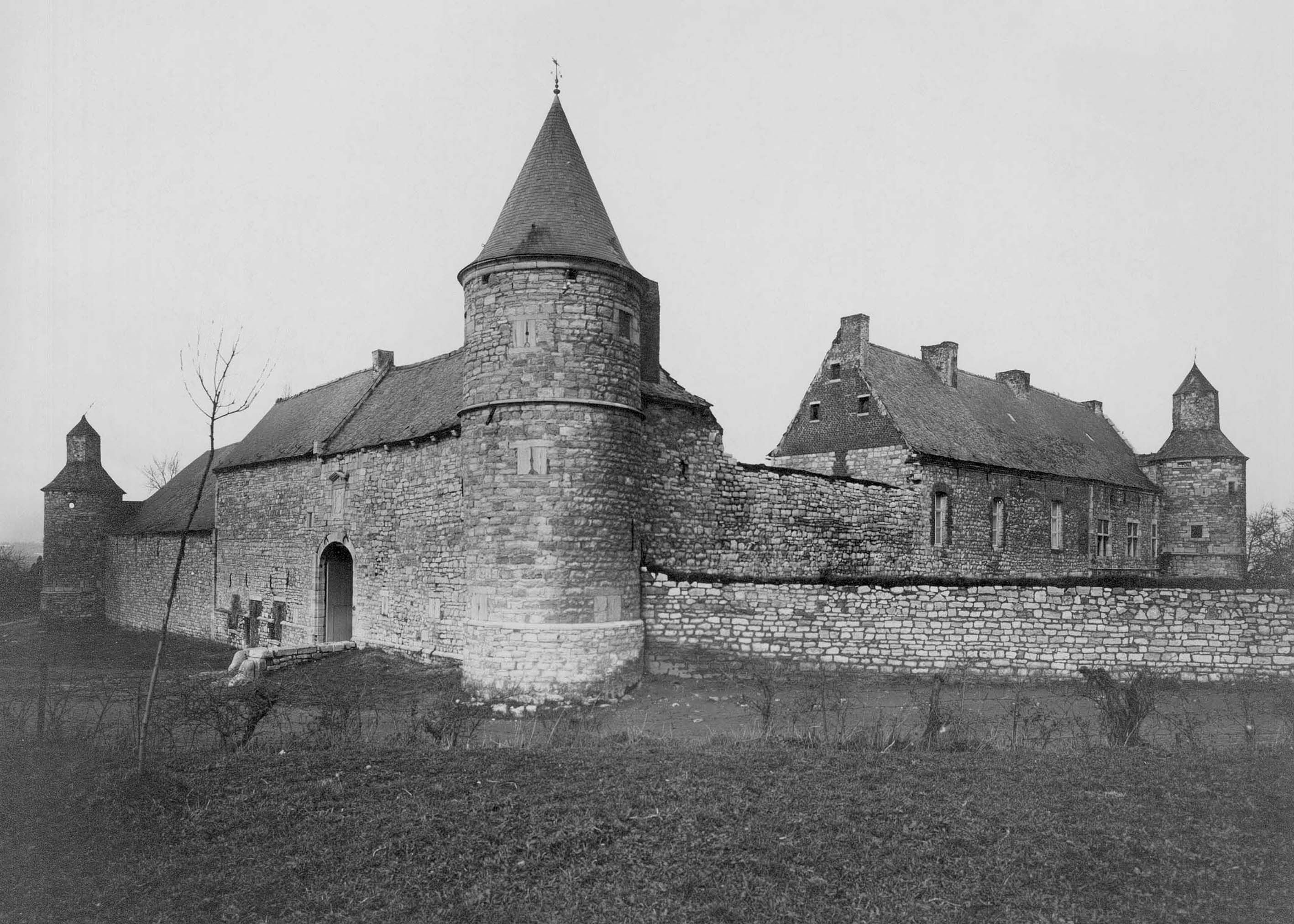 Mont-sur-Marchienne (Charleroi-[:fr:Belgique|Belgique ) - Ancien château-ferme de la Torre vue d'ensemble depuis le Sud et l'Est. Photo d'Edmond Rahir (1864-1936).